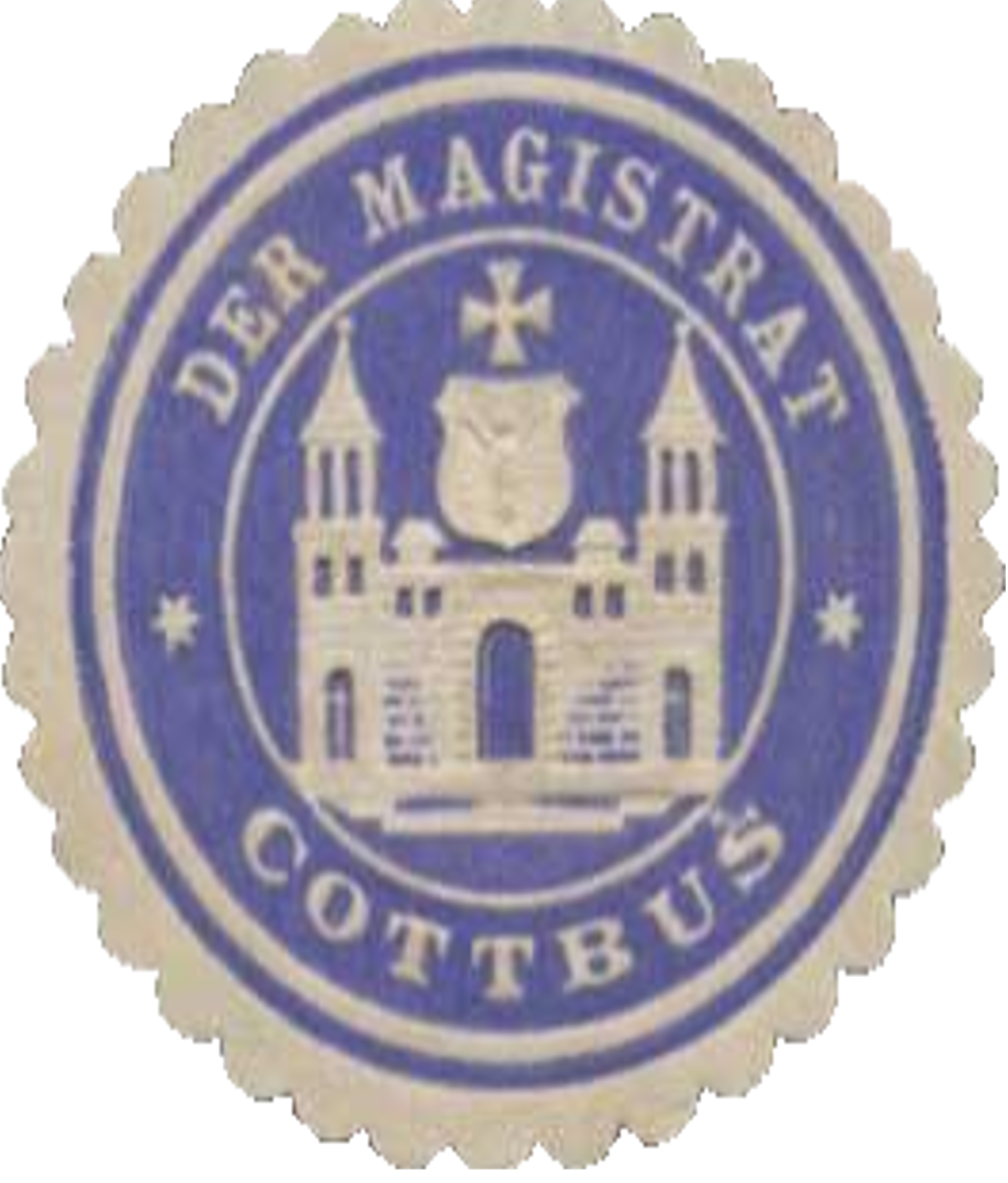 Wappen-Cottbus, 1900